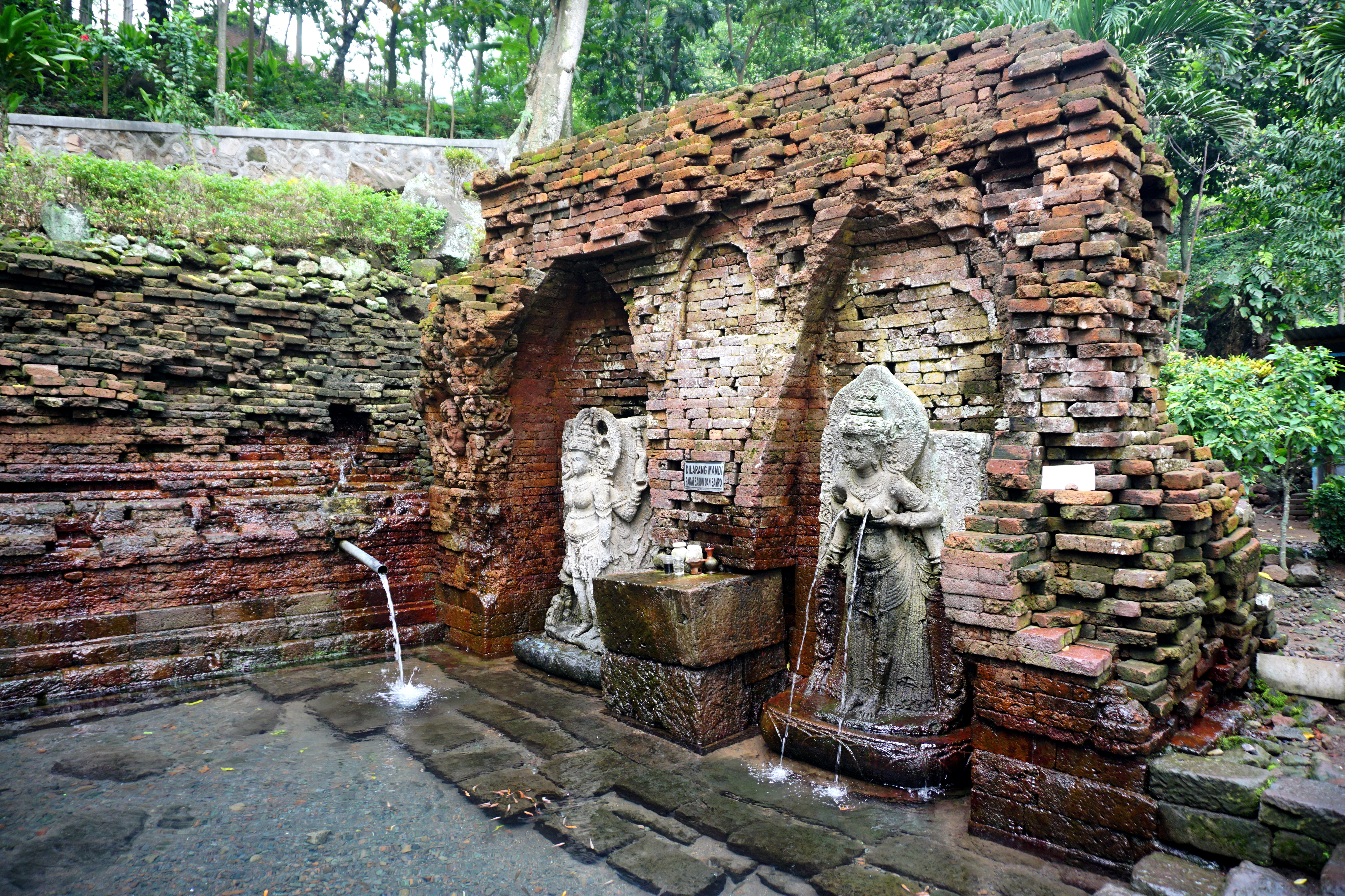 041 Fountain Figures, Candi Belahan, Pasuruan Candis, East Java Pasuruan, East Java